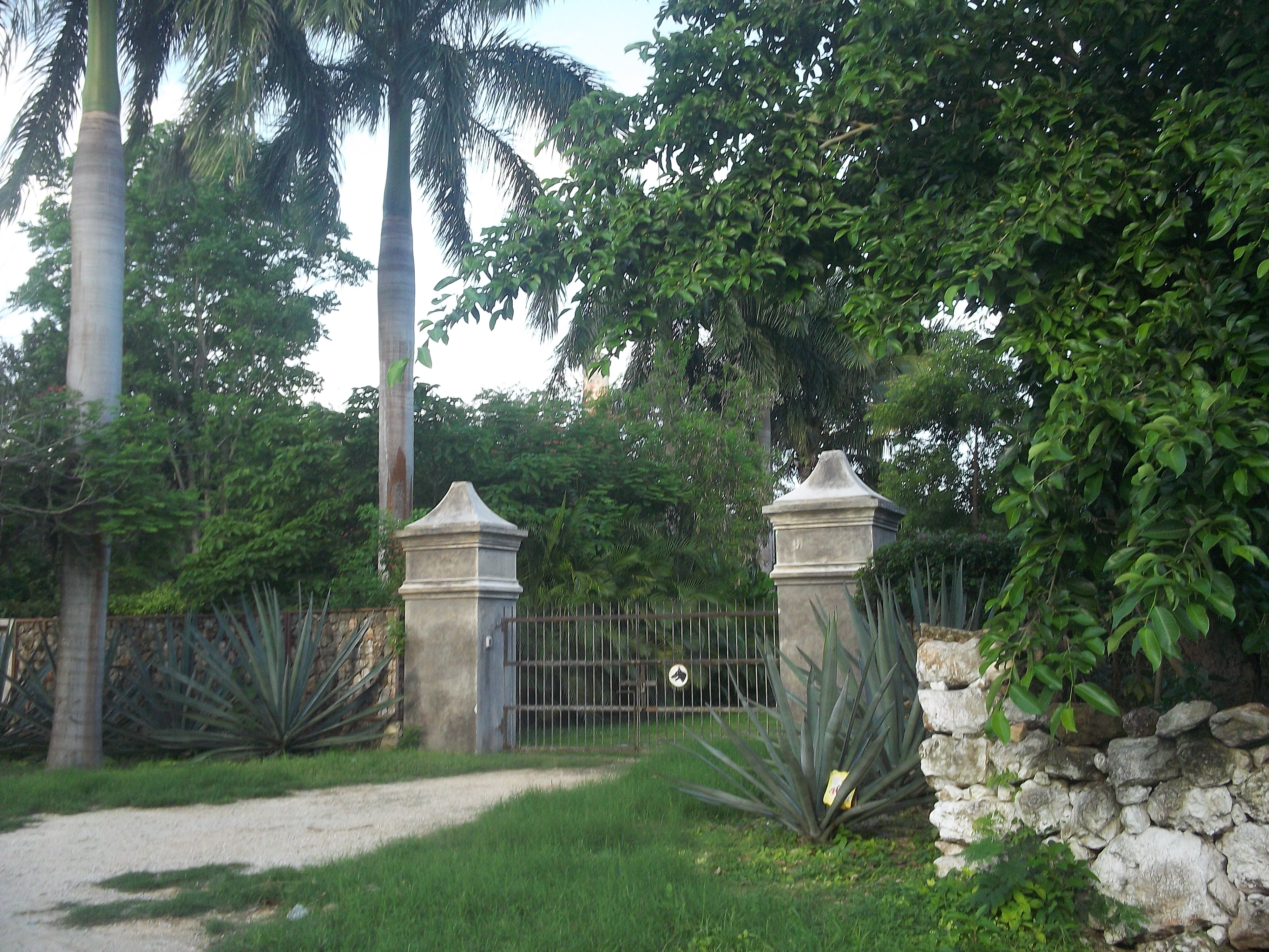 Hacienda de San Antonio Sac Chich, Yucatán.